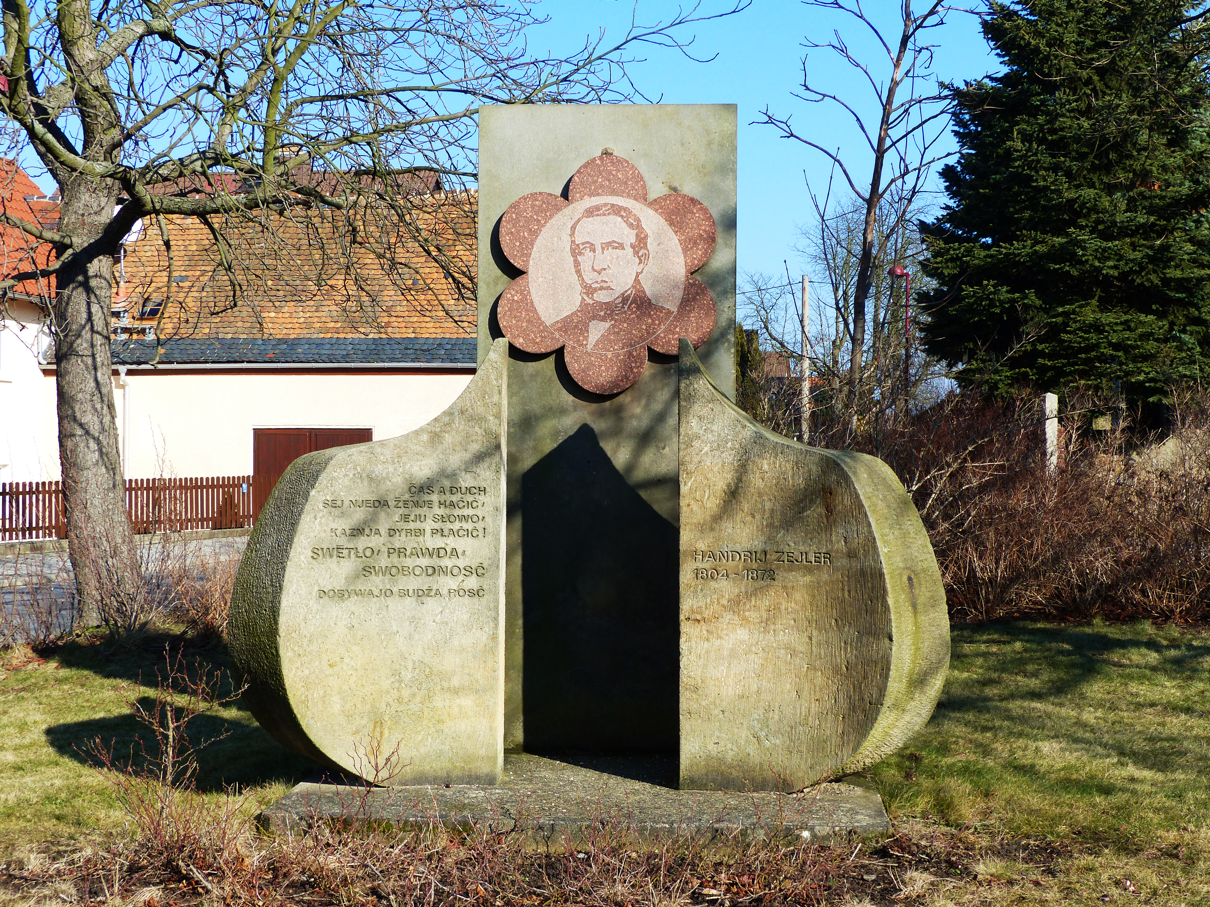 Handrij Zejler-Denkmal in Salzenforst Hornjoserbsce: Pomnik Handrijej Zejlerjej w Słonej Boršći.